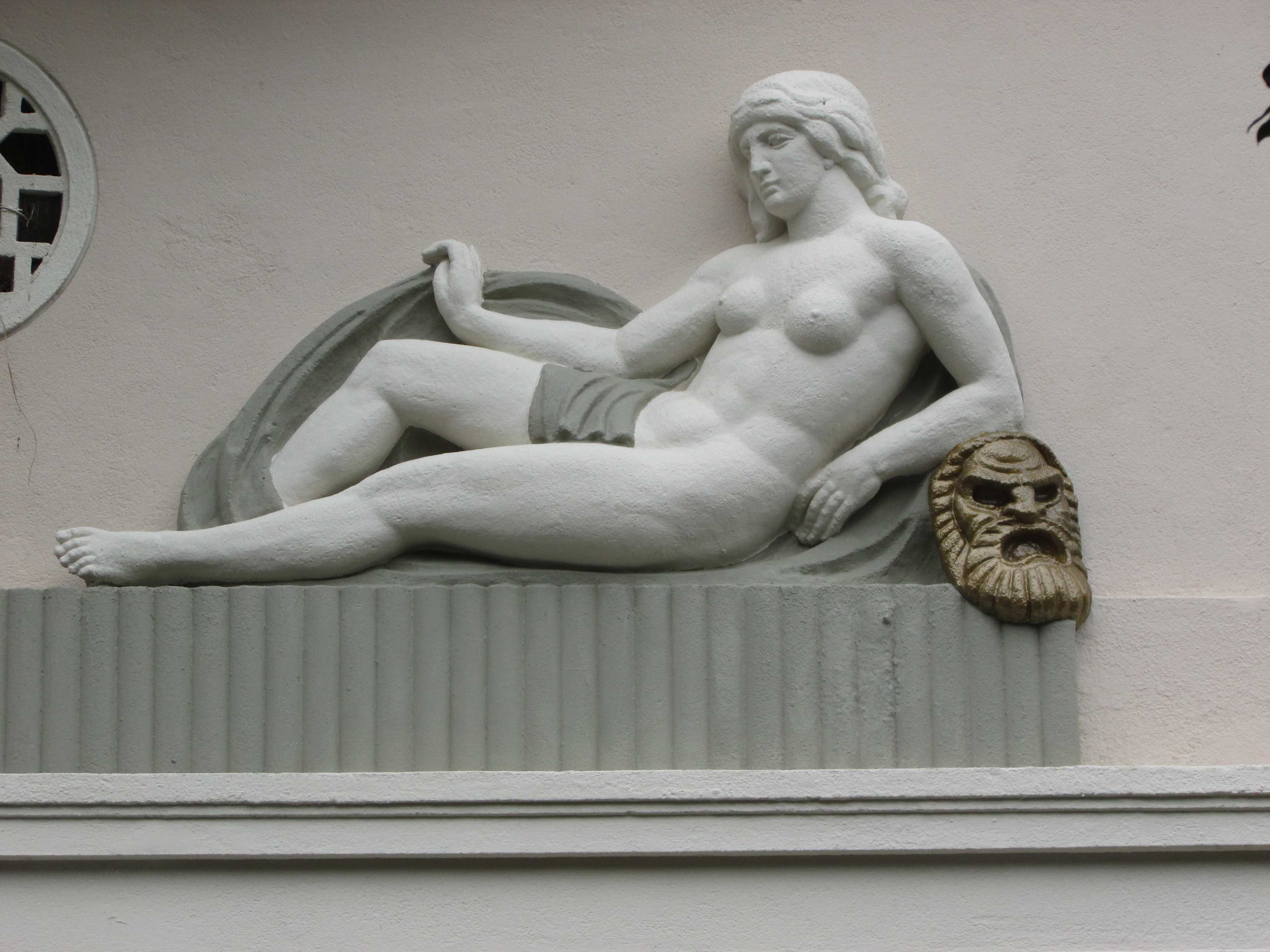 Máscara da tragédia no teatro